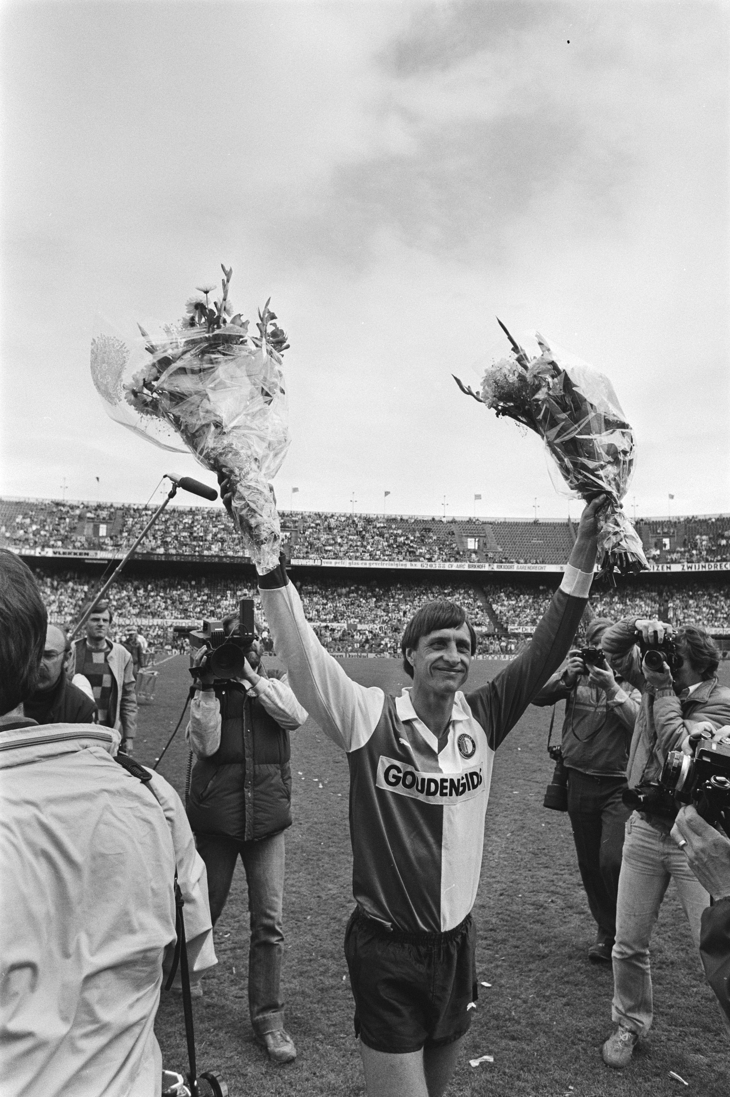 Collectie / Archief : Fotocollectie Anefo Reportage / Serie : [ onbekend ] Beschrijving : Feyenoord tegen PEC, met afscheid Johan Cruijff ; Johan Cruijff zwaaiend met bloemen Datum : 13 mei 1984 Trefwoorden : sport, voetbal Persoonsnaam : Cruijff, Johan Instellingsnaam : Feyenoord, PEC Zwolle Fotograaf : Bogaerts, Rob / Anefo Auteursrechthebbende : Nationaal Archief Materiaalsoort : Negatief (zwart/wit) Nummer archiefinventaris : bekijk toegang 2.24.01.05 Bestanddeelnummer : 932-9659